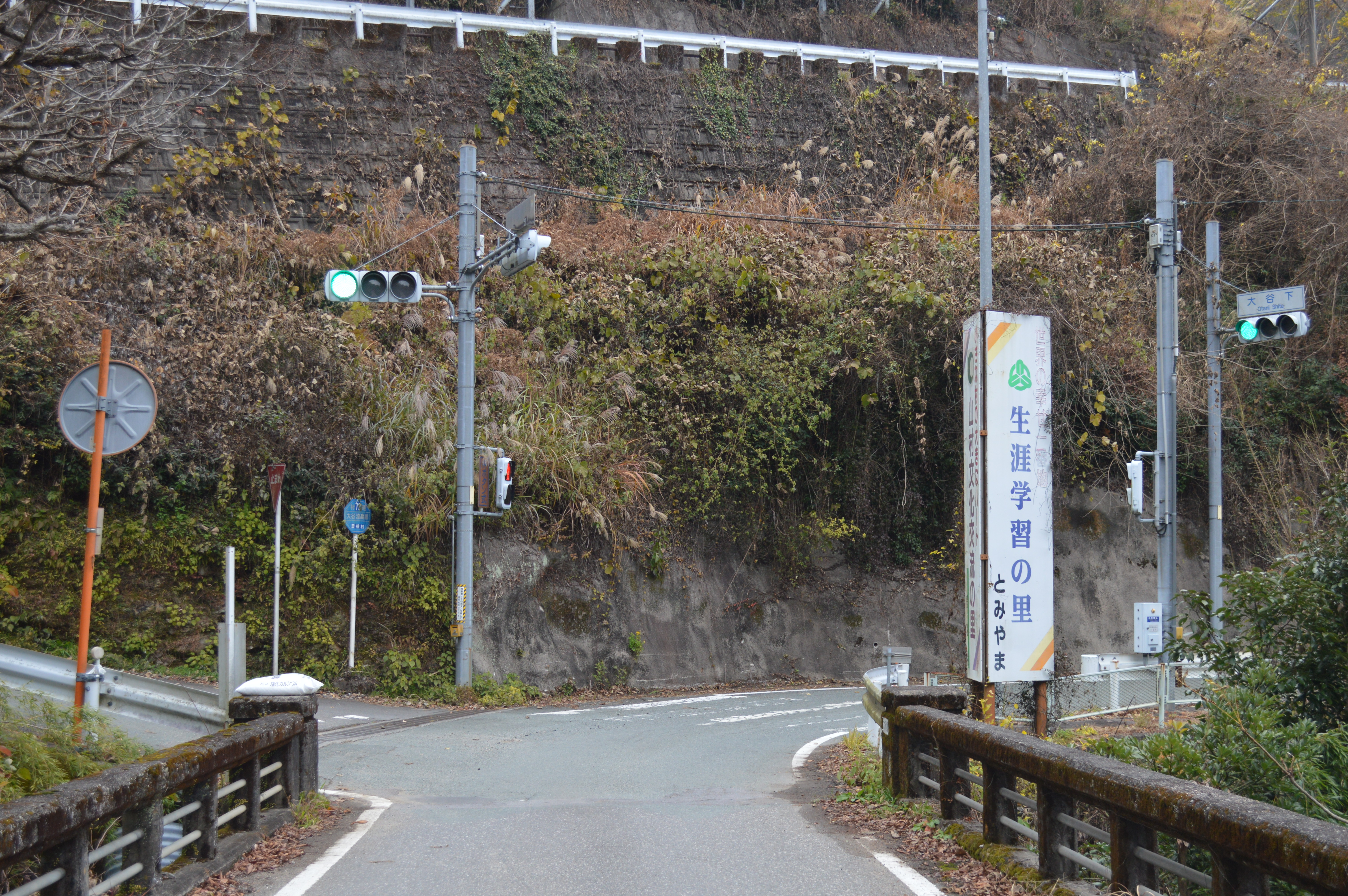 愛知県北設楽郡豊根村富山にある愛知県道1号の「大谷下」交差点。